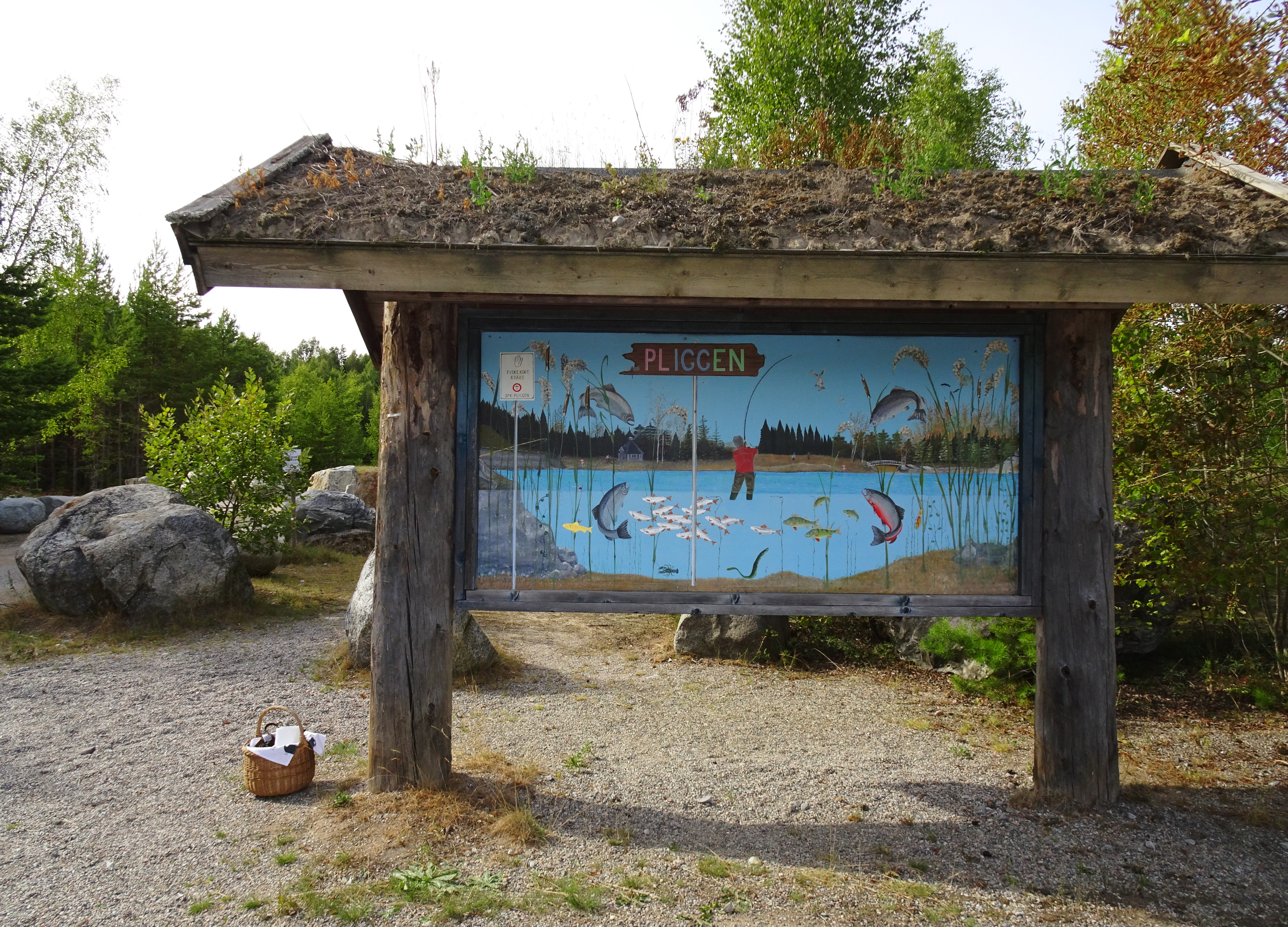 Informationstavla vid Laxsjön på Munsön